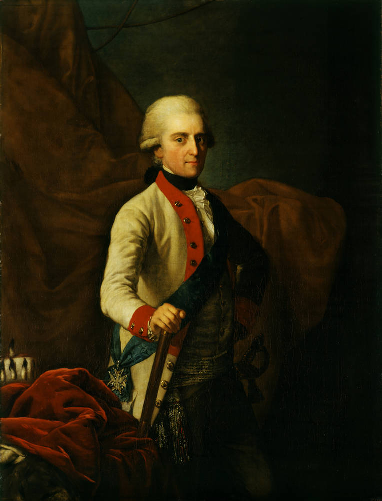 Kurfürst Friedrich August III. von Sachsen (1750-1827)